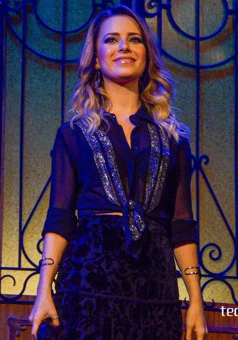 Sandy no show da estreia da Turnê Meu Canto em maio de 2016.